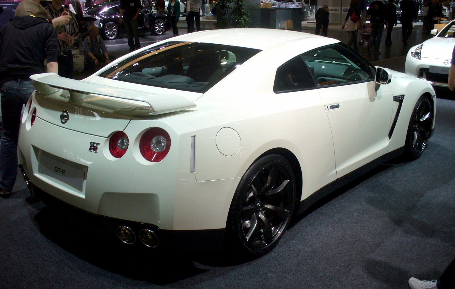 Nissan GT-R